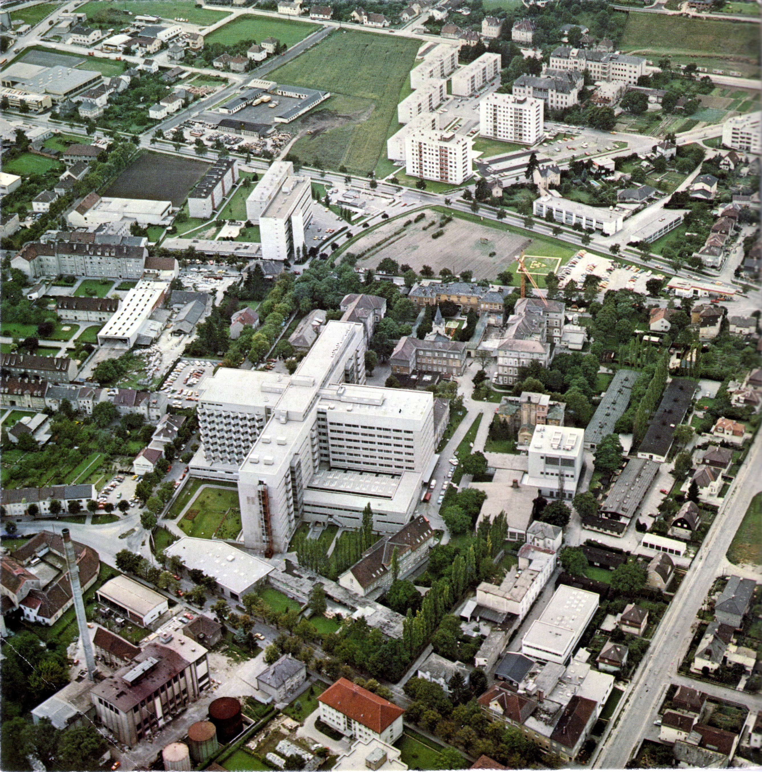 Landesklinikum St. Pölten